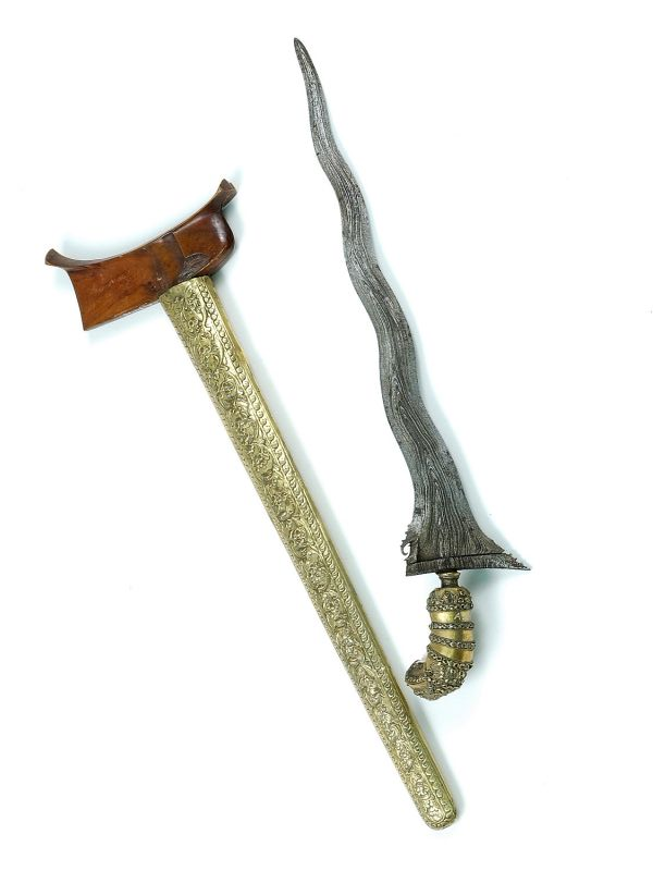 Kris. Kris met schede Unknown language: Keris